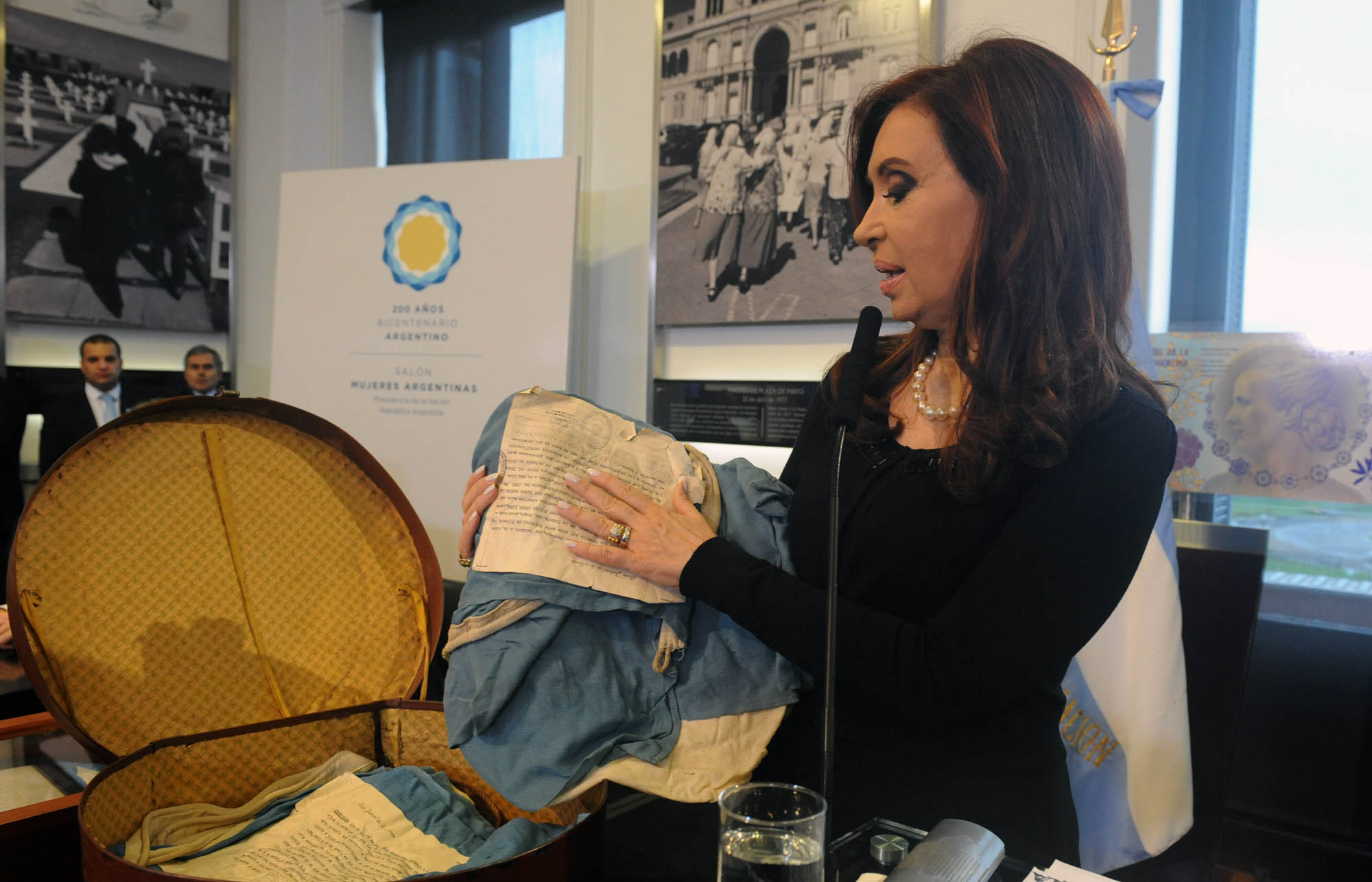 La presidenta Cristina Fernández encabezó un acto de homenaje al Gaucho Antonio Rivero, en conmemoración del 179 aniversario del izamiento de la bandera argentina en suelo malvinense. "Rivero tenía 20 años cuando pisó Malvinas. Un momento de la vida en donde aflora el amor a la patria y los sentimientos por los compatriotas", afirmó la mandataria. Operativo Cóndor La Presidenta homenajeó asimismo a los miembros del Operativo Cóndor, que en 1966 secuestraron un avión de Aerolíneas y lo aterrizaron en las islas para reclamar la soberanía argentina sobre Malvinas. La mandataria destacó la figura de María Cristina Verrier, esposa de Dardo Cabo, la única mujer del operativo Cóndor, de quien se leyó en el acto una carta en la que da en custodia a la jefa de Estado las banderas que izaron en Malvinas. En la carta, además, se destaca el lugar que tienen las mujeres en Argentina desde el 2003, cuando asumió el gobierno Néstor Kirchner. Al respecto, la jefa de Estado comentó: "Recibí hace poco la visita de María Cristina Verrier, esposa de Dardo Cabo, ideóloga de la operación Cóndor y única mujer que participó del mismo", quien le diera en custodia las banderas argentinas izadas en Malvinas. El Operativo Cóndor fue una acción llevada a cabo en 1966 por un grupo de argentinos que desvió un avión civil de Aerolíneas Argentinas y obligó a su comandante a aterrizar en las islas Malvinas.